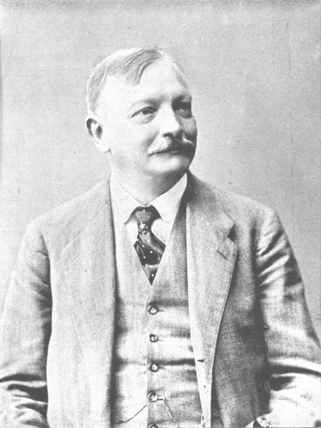 Gustav Maran (legal name: Gustav Dolezal; 1854-1917), Austrian actor